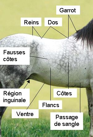 Exemplo de boa conformação morfológica. Corpo anatomía de um Mangalarga Marchador. Bill Vidigal Haras Bomirar